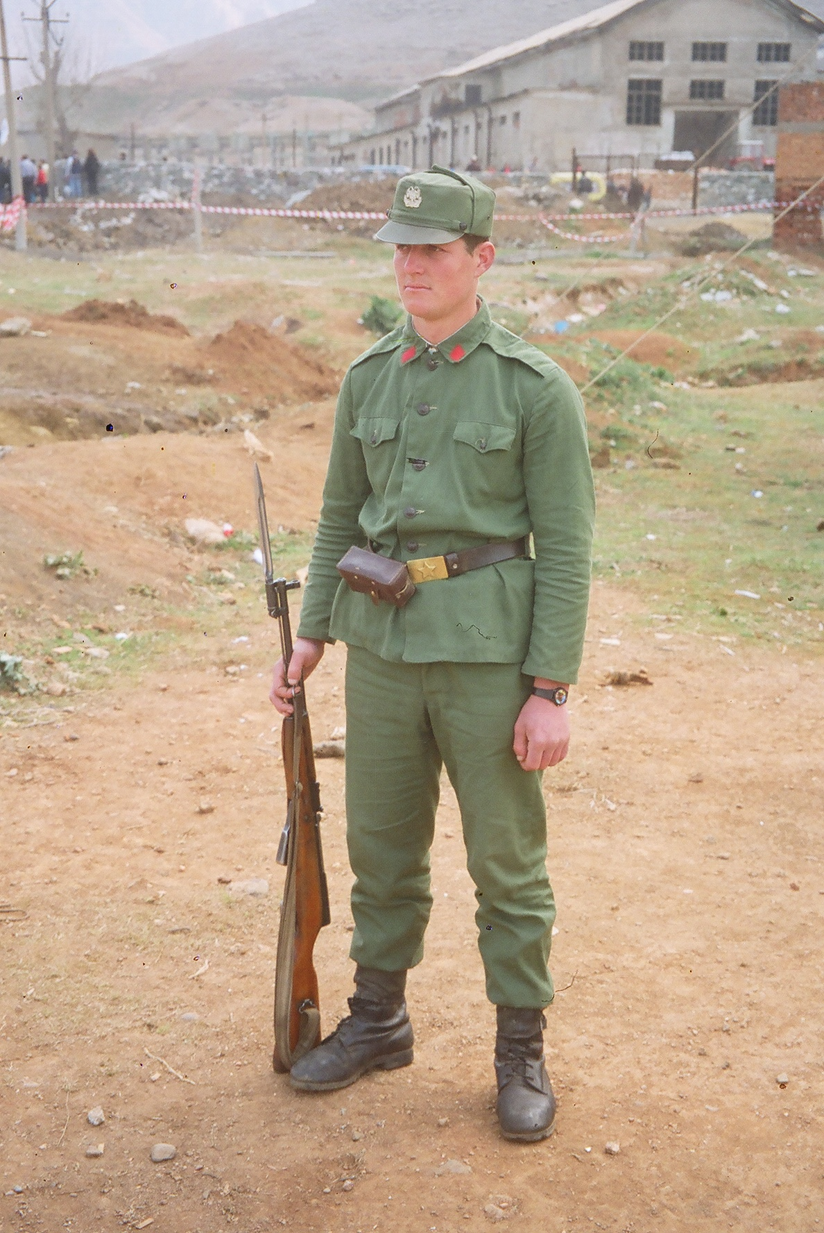 Foto e Ushtarit te Ushtrise Popullore